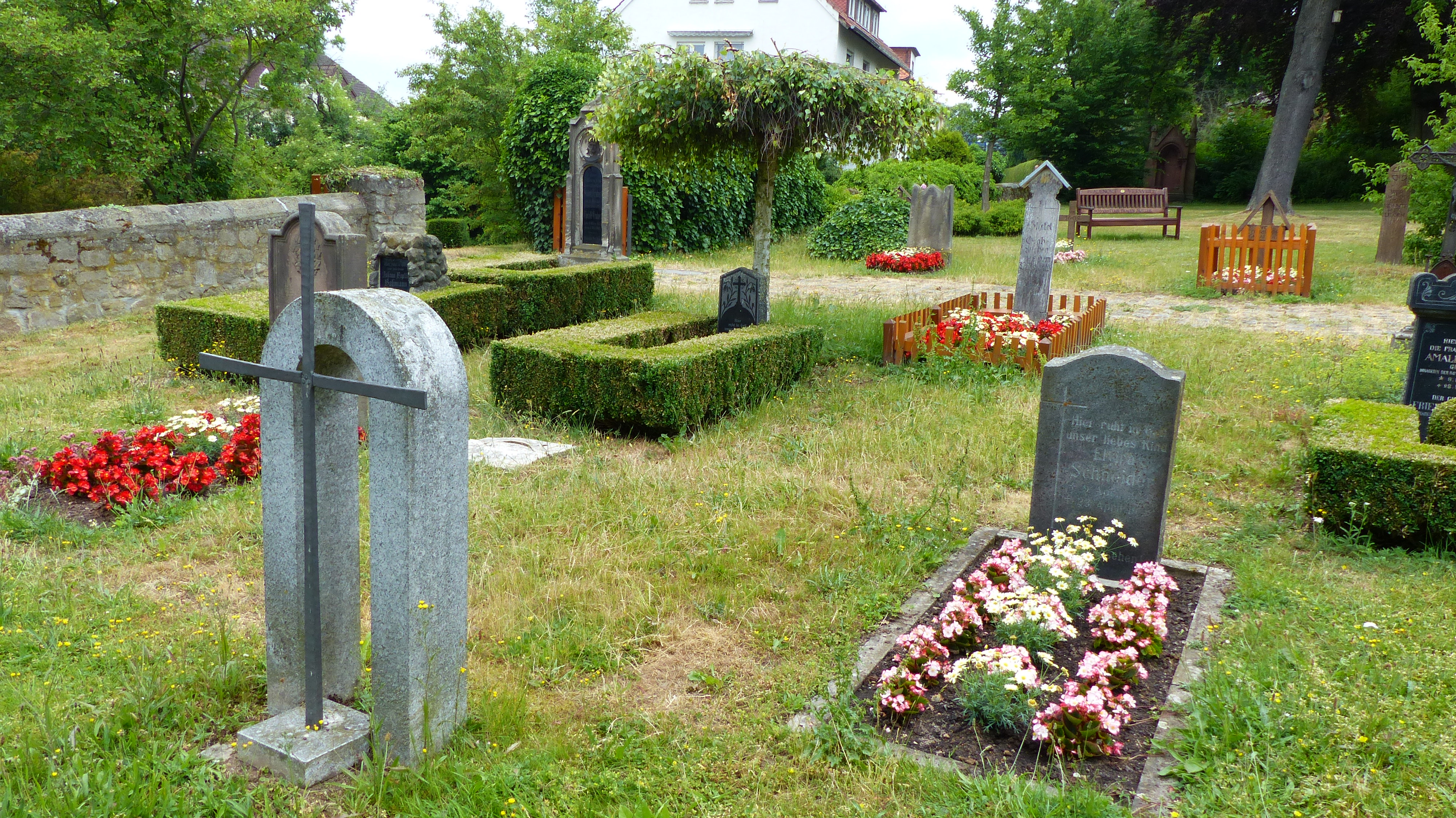 Alter Dompfarrlicher Friedhof Fulda